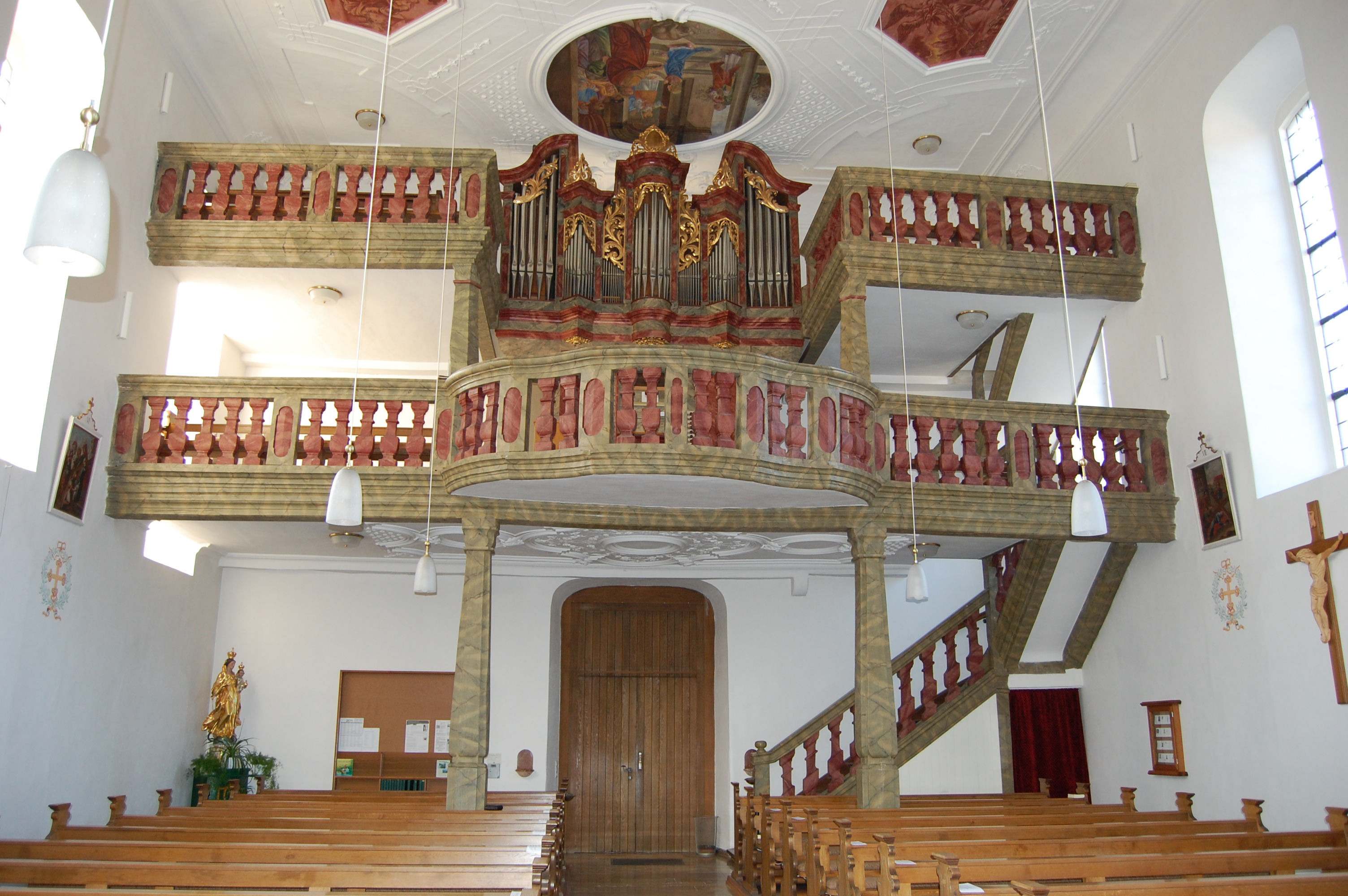 Innenansicht Kirche Mariä Himmelfahrt, Fridritt, Stadt Münnerstadt, Kreis Bad Kissingen (2011)